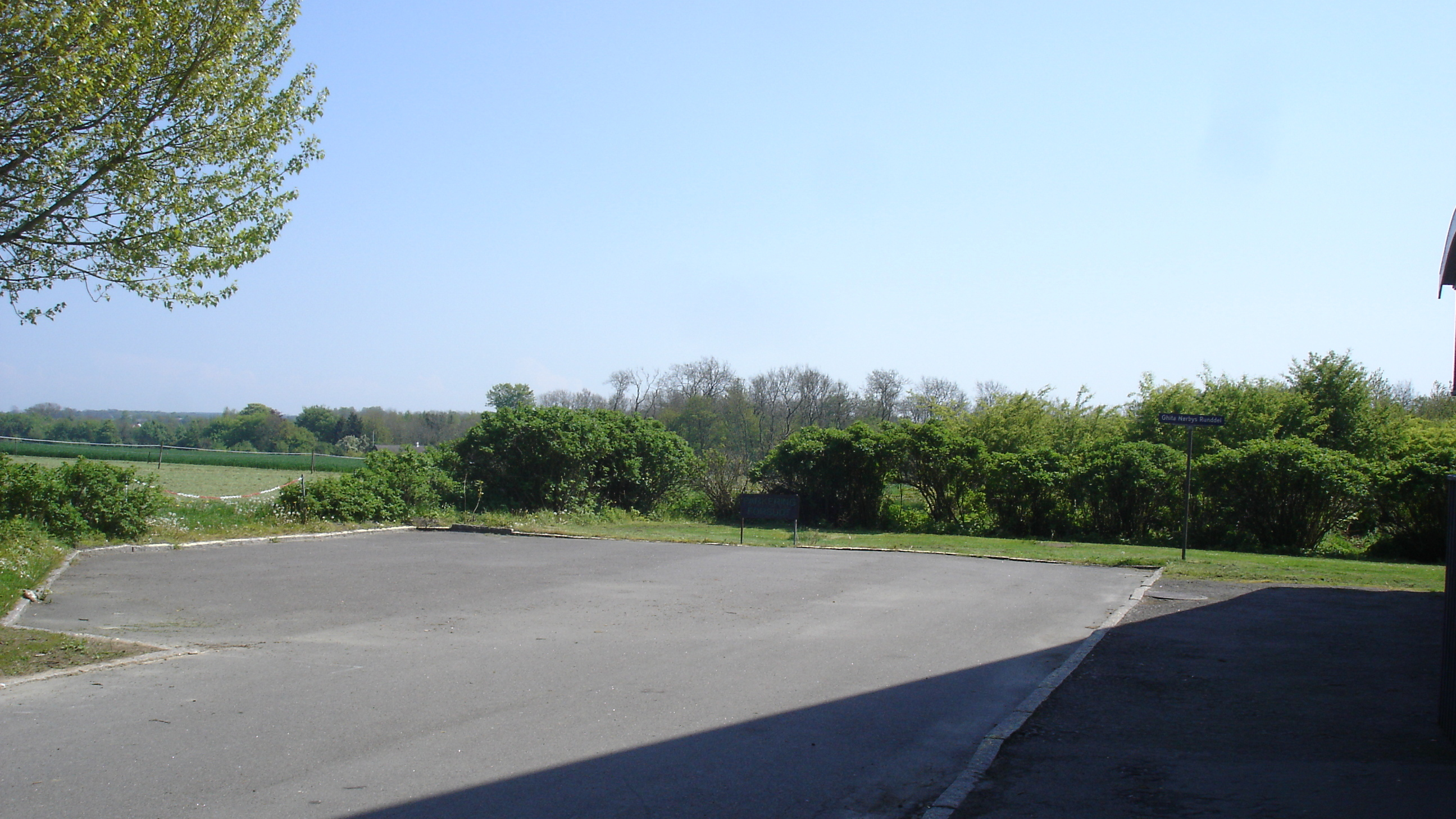 Ghita Nørbys Runddel i Østermarie